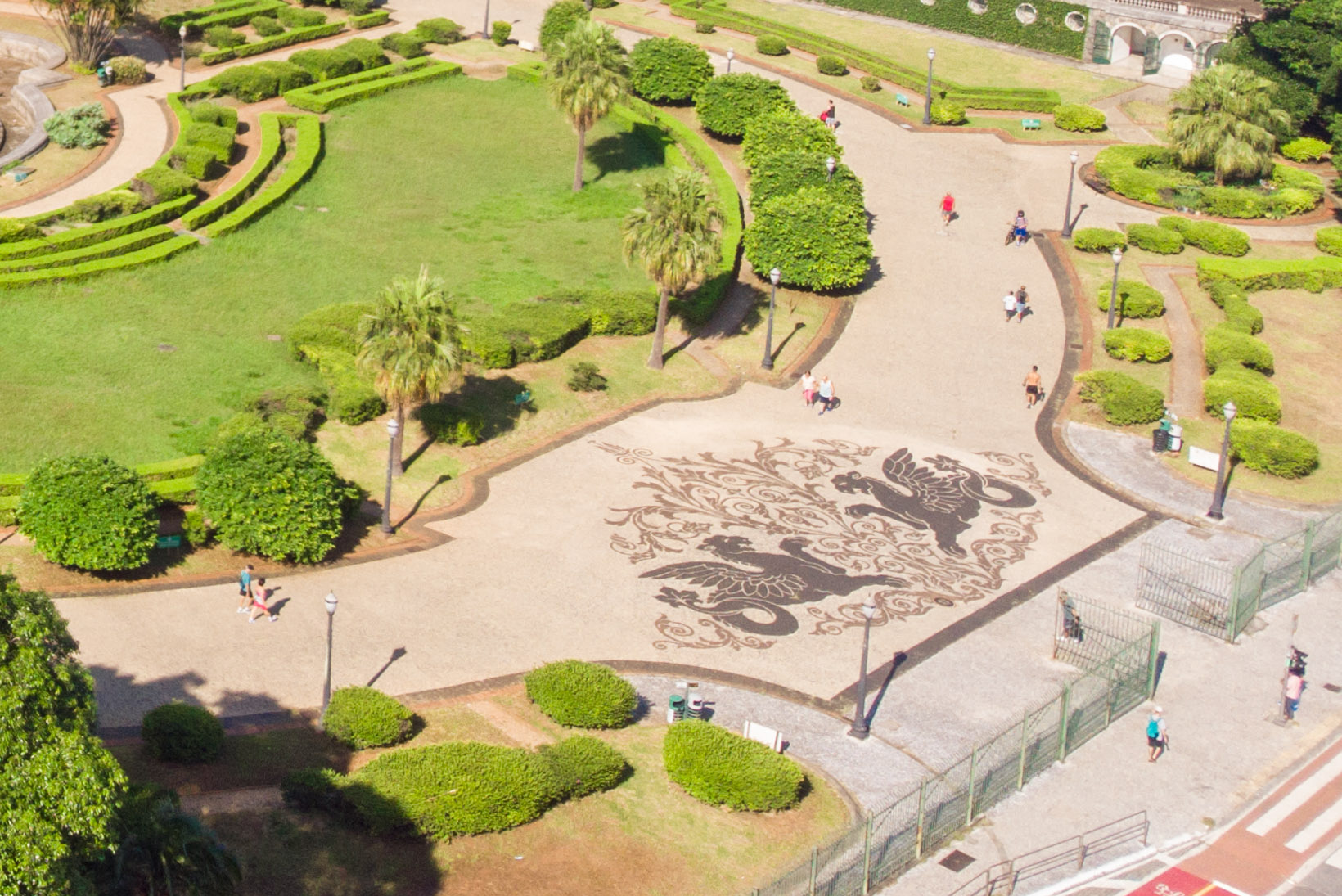 Imagens do Museu do Ipiranga. Local: São Paulo/SP Data: 26/03/2019 Foto: Governo do Estado de São Paulo